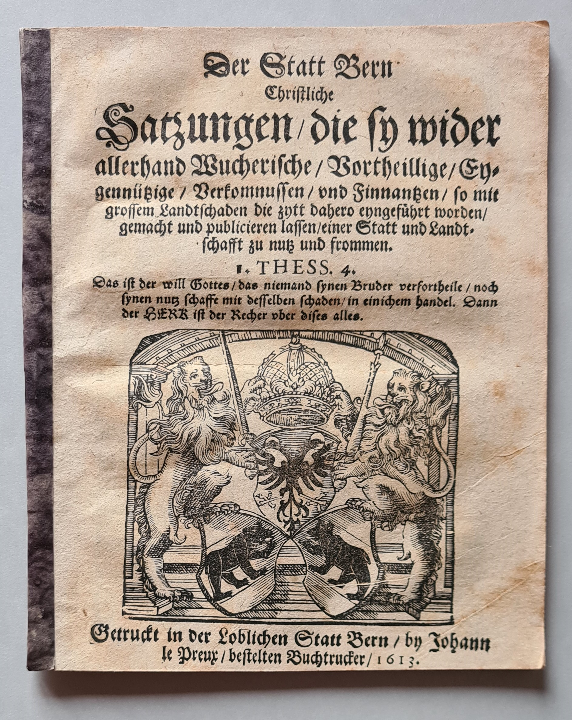 Der Statt Bern christliche Satzungen, die sy wider allerhand wucherische, vortheillige, eygennützige Verkomnussen unnd Finnantzen, so mit grossem Landtschaden die Zytt dahero eyngeführt worden, gemacht und publicieren lassen : einer Statt und Landtschafft zu Nutz und Frommen. Getruckt in der loblichen Statt Bern : by Johann Le Preux, bestelten Buchtrucker, 1613